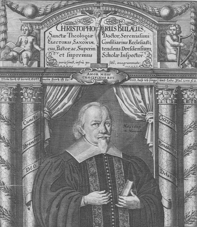 Christphorus Bulaeus, Kupferstichportrait um 1660